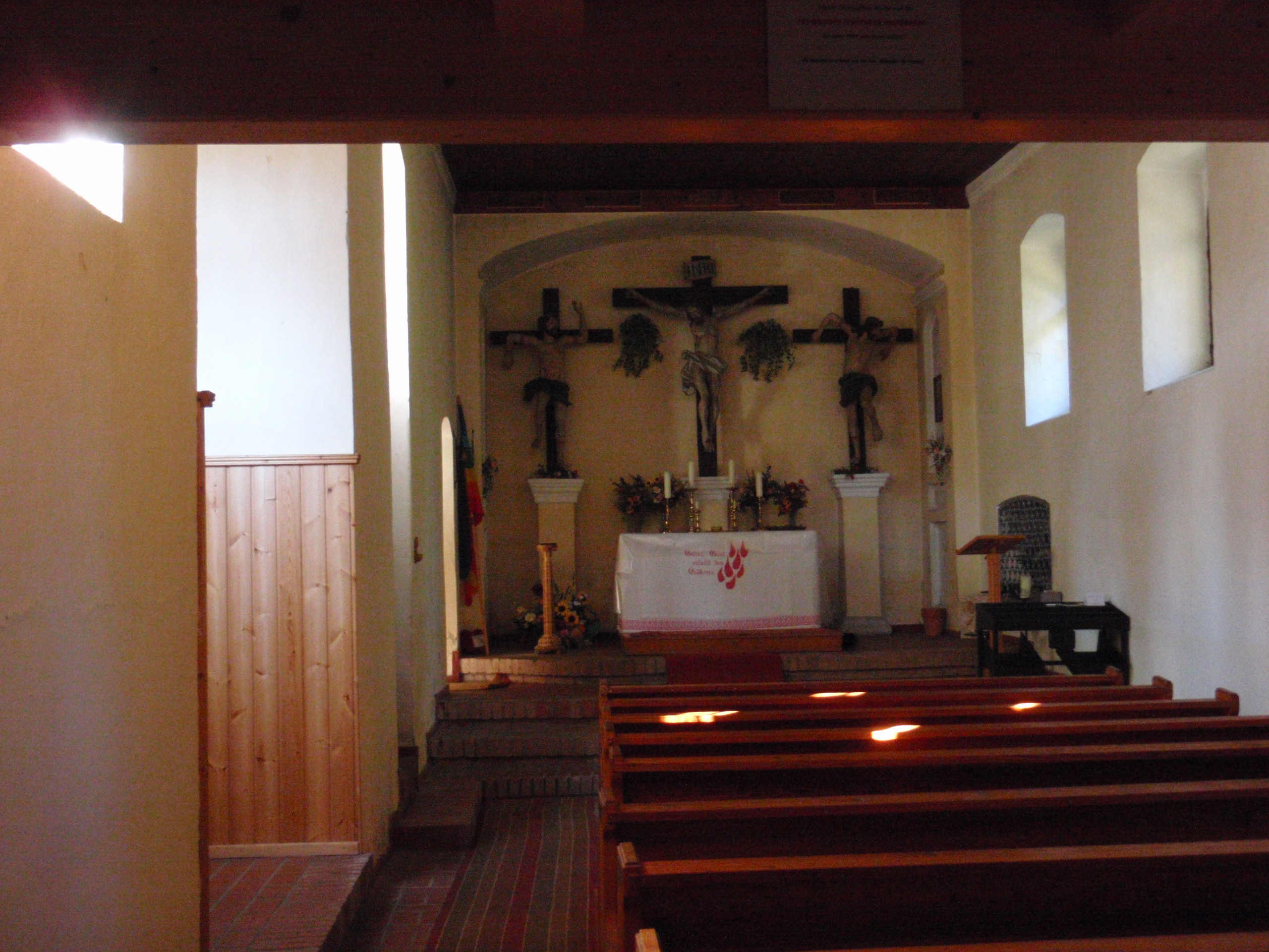 Innenansicht der Kalvarienbergkirche am Tremmelberg; eigene Aufnahme des Autors